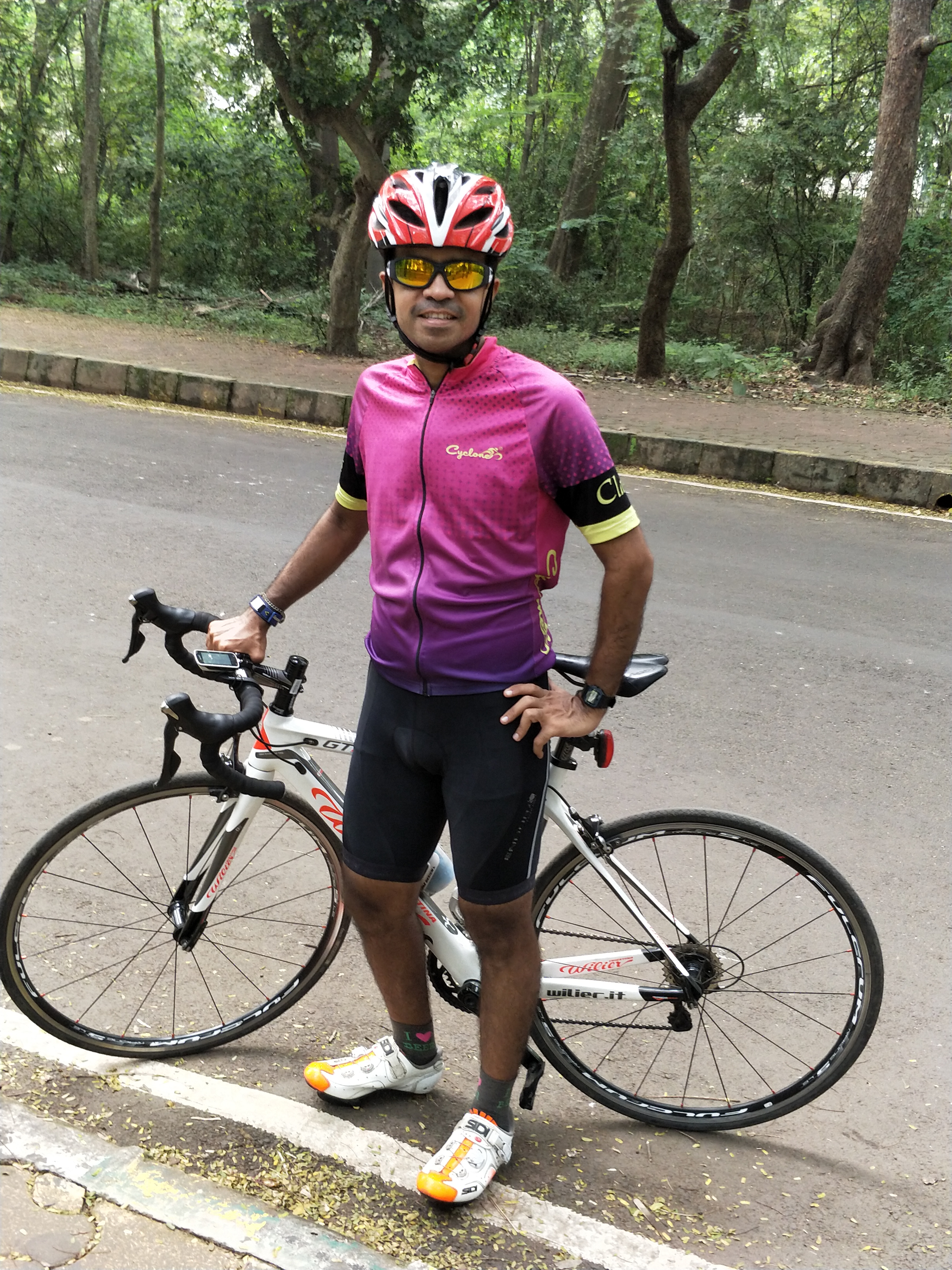 Middle Aged Man In Lycra aka Mamil